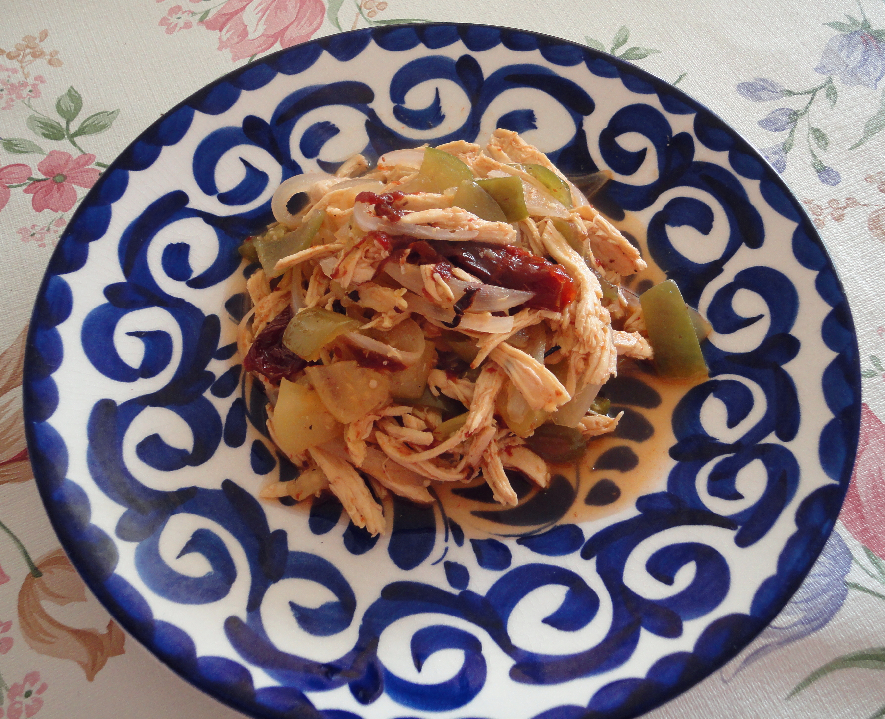 Guiso mexicano de pollo, usado para hacer tostadas